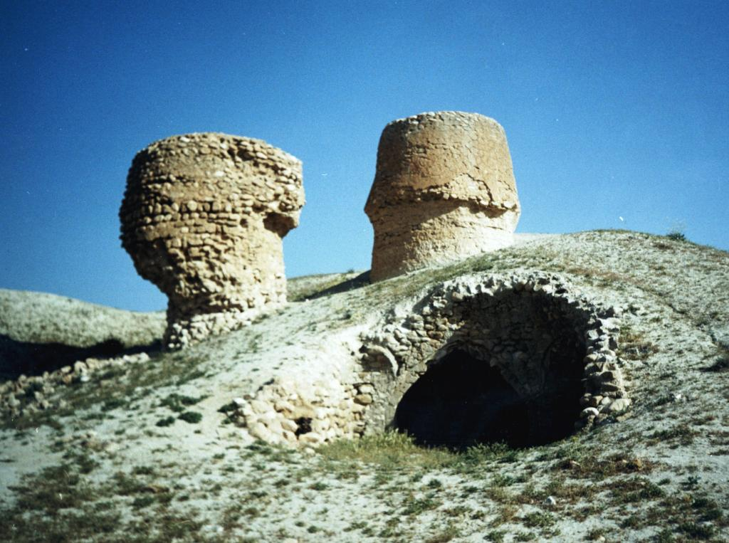 مرحوم دهخدا در لغتنامه خود راجع به قطب آباد در دهه 40 شمسی می نویسد:قصبه مرکز بخش دهستان کردیان از شهرستان جهرم . مختصات جغرافیائی آن عبارتند از: طول 53 درجه و 37 دقیقه از گرینویچ ، عرض 28 درجه و 39 دقیقه . ارتفاع آن از سطح دریا در حدود 1060 گز است . این قصبه در 18 هزارگزی شمال خاور جهرم و 52 هزارگزی جنوب شهر فساواقع است و به دو شهر مزبور و شهر شیراز به وسیله شوسه مربوط میباشد. هوای آن گرم و خشک و آب مشروب قصبه از باران است که در آب انبار جمع و نگاهداری میشود،آب برای زراعت از چشمه شور، و دیمی کاری زیاد است . محصولات عبارتند از غلات ، پنبه ، خرما، تریاک ، مرکبات و شغل اهالی زراعت و باغداری و کسب ، صنایع دستی زنان قالی بافی . سکنه مطابق آخرین آمار 1913 تن است . از ادارات دولتی فقط بخشداری و دفتر پست و در حدود 10 باب دکان و یک دبستان نیز دارد. در 2هزارگزی شمال باخترآن خرابه های بندی که برای جمعآوری آب باران ساخته شده بود دیده میشود. (از فرهنگ جغرافیایی ایران ج 7).